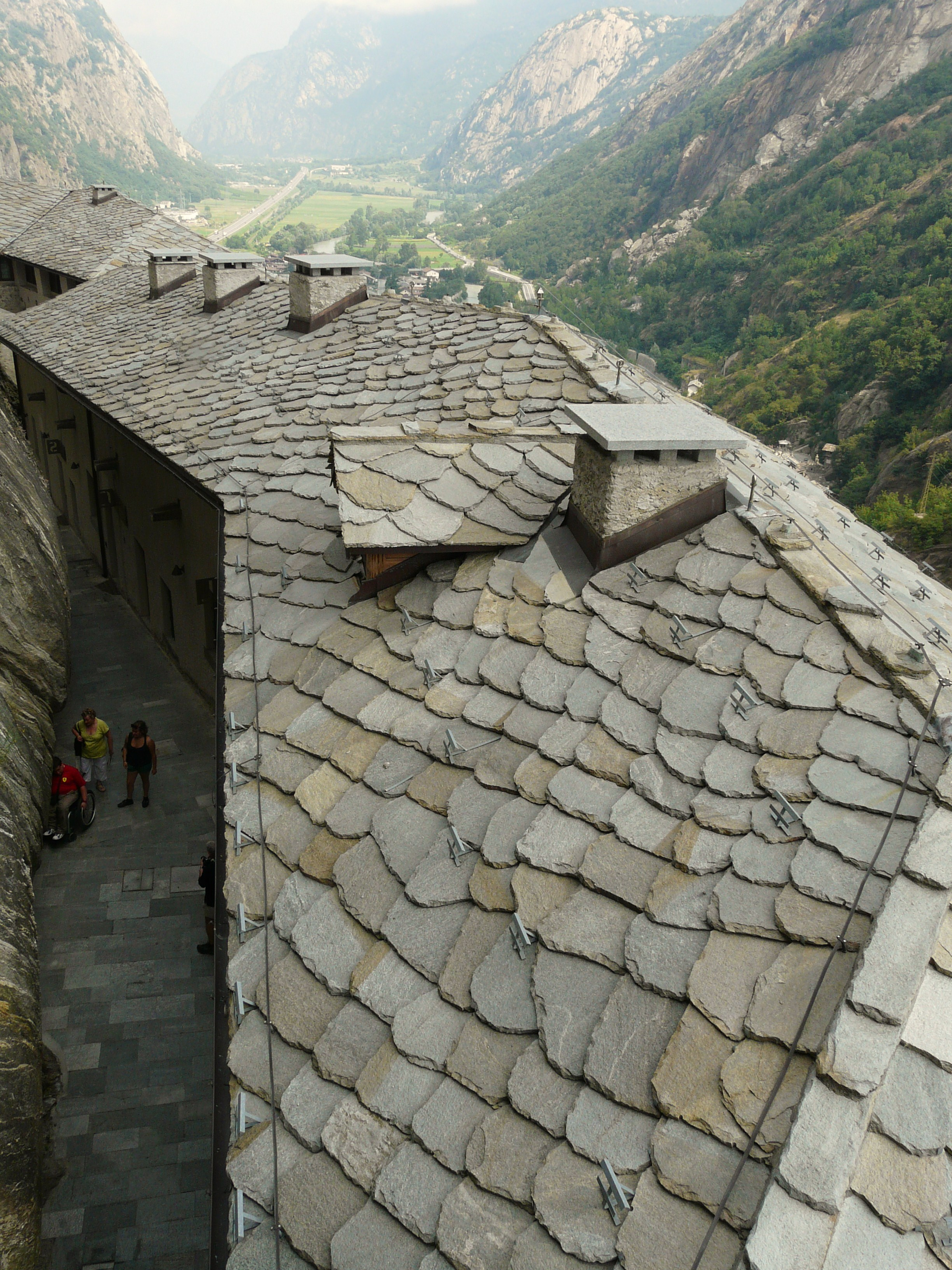 Serie di immagini del Forte di Bard, Valle d'Aosta, Italia